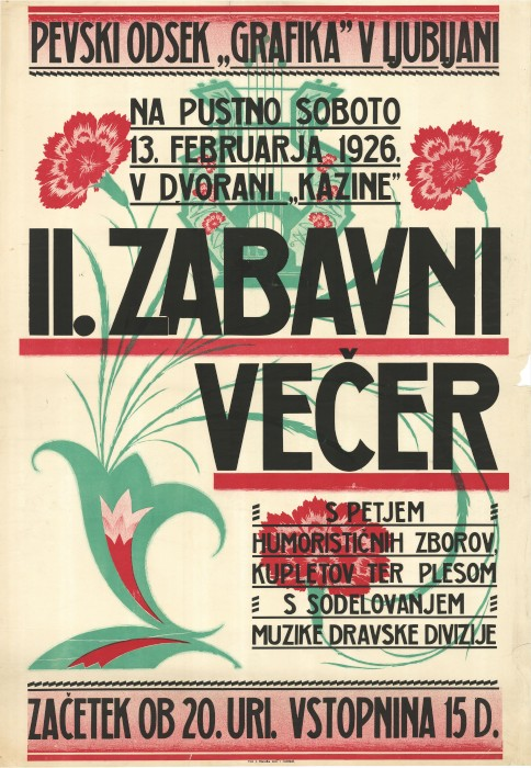 Plakat za II. zabavni večer - pevski odsek "Grafika" v Ljubljani